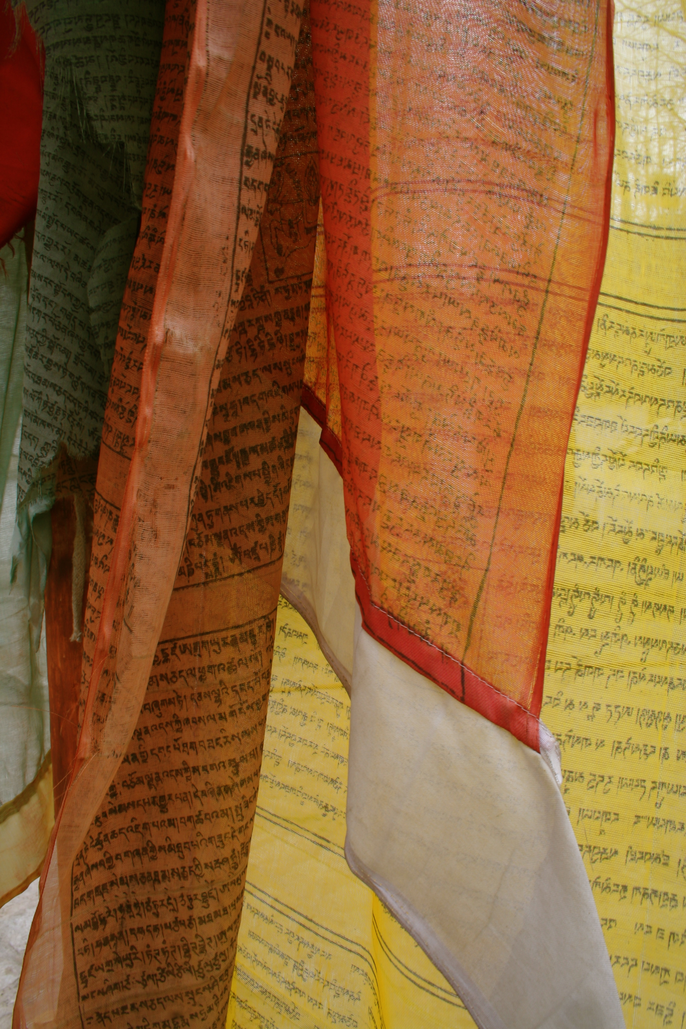 Prayer Flags